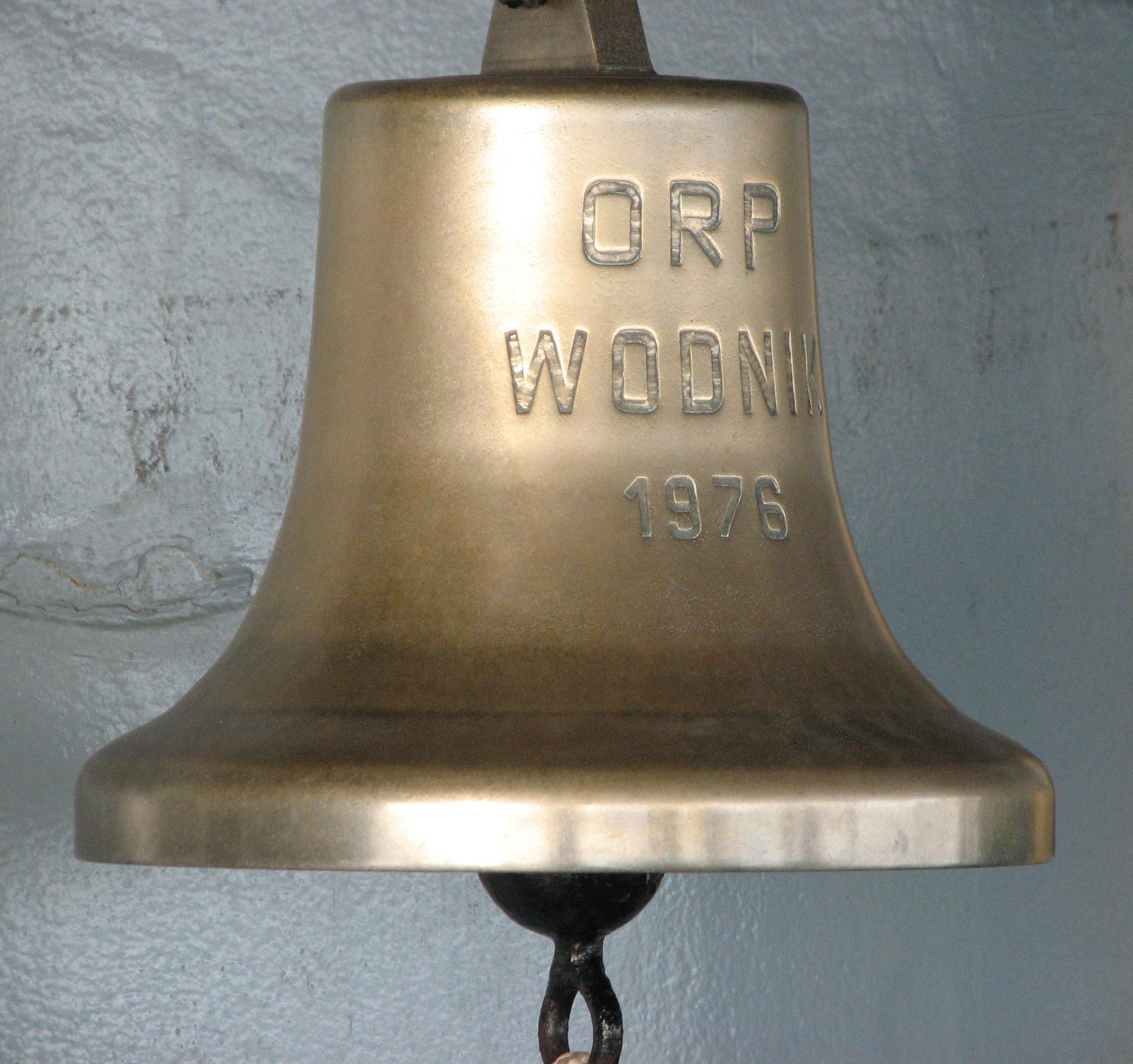 Port Wojenny Gdynia. Dzwon okrętowy na okręcie szkolnym projektu 888 ORP "Wodnik" z dywizjonu Okrętów Wsparcia (3 Flotylla Okrętów).